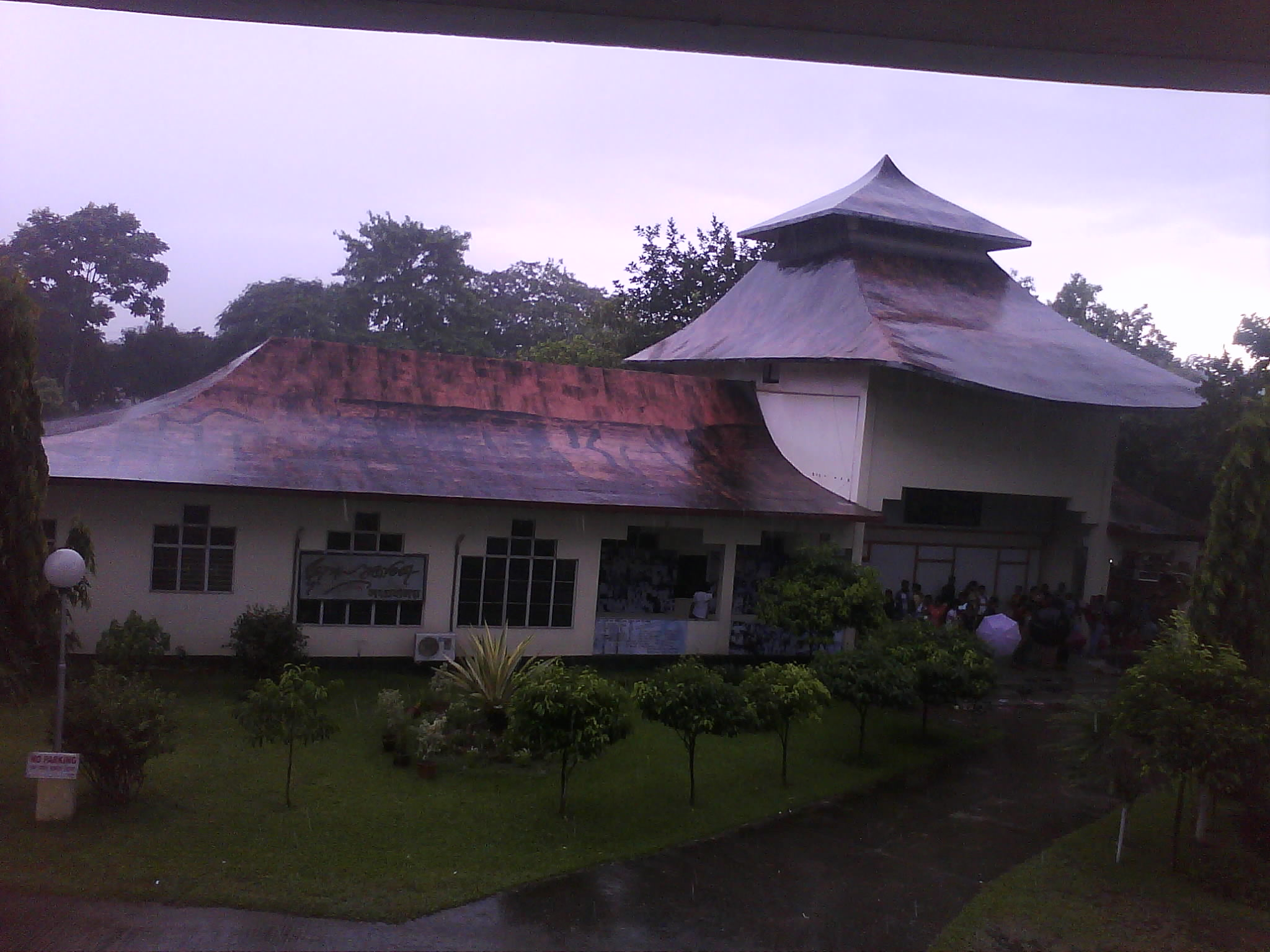 অসমীয়া: গুৱাহাটীত অৱস্থিত ভূপেন হাজৰিকাৰ সংগ্ৰহালয়